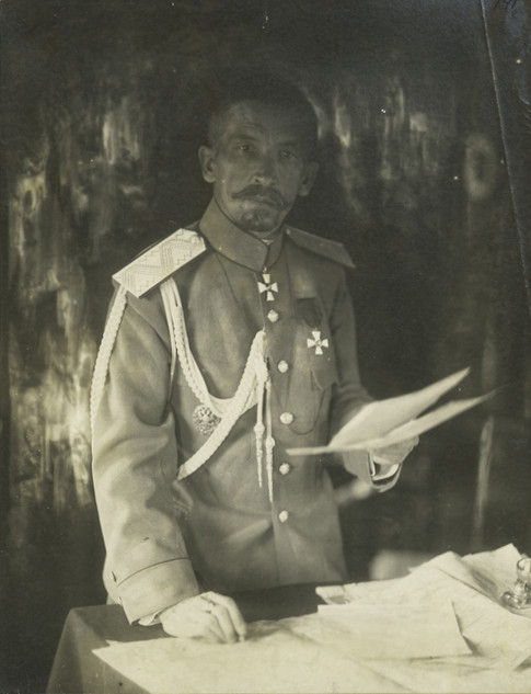 El general ruso Lavr Kornilov.